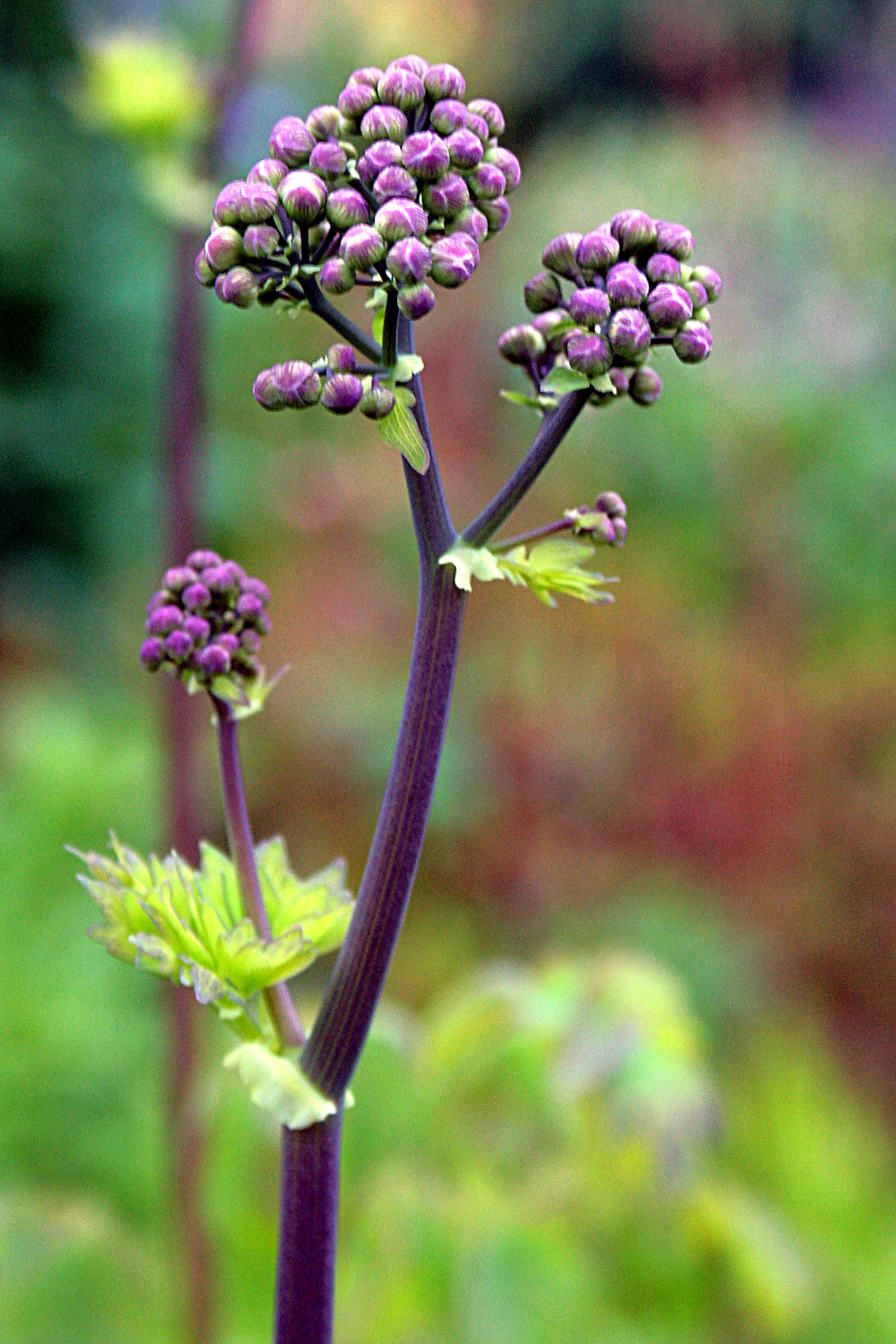 Stöðvarfjörður: Im Steingarten des Museums “Petra Sveinsdóttir”